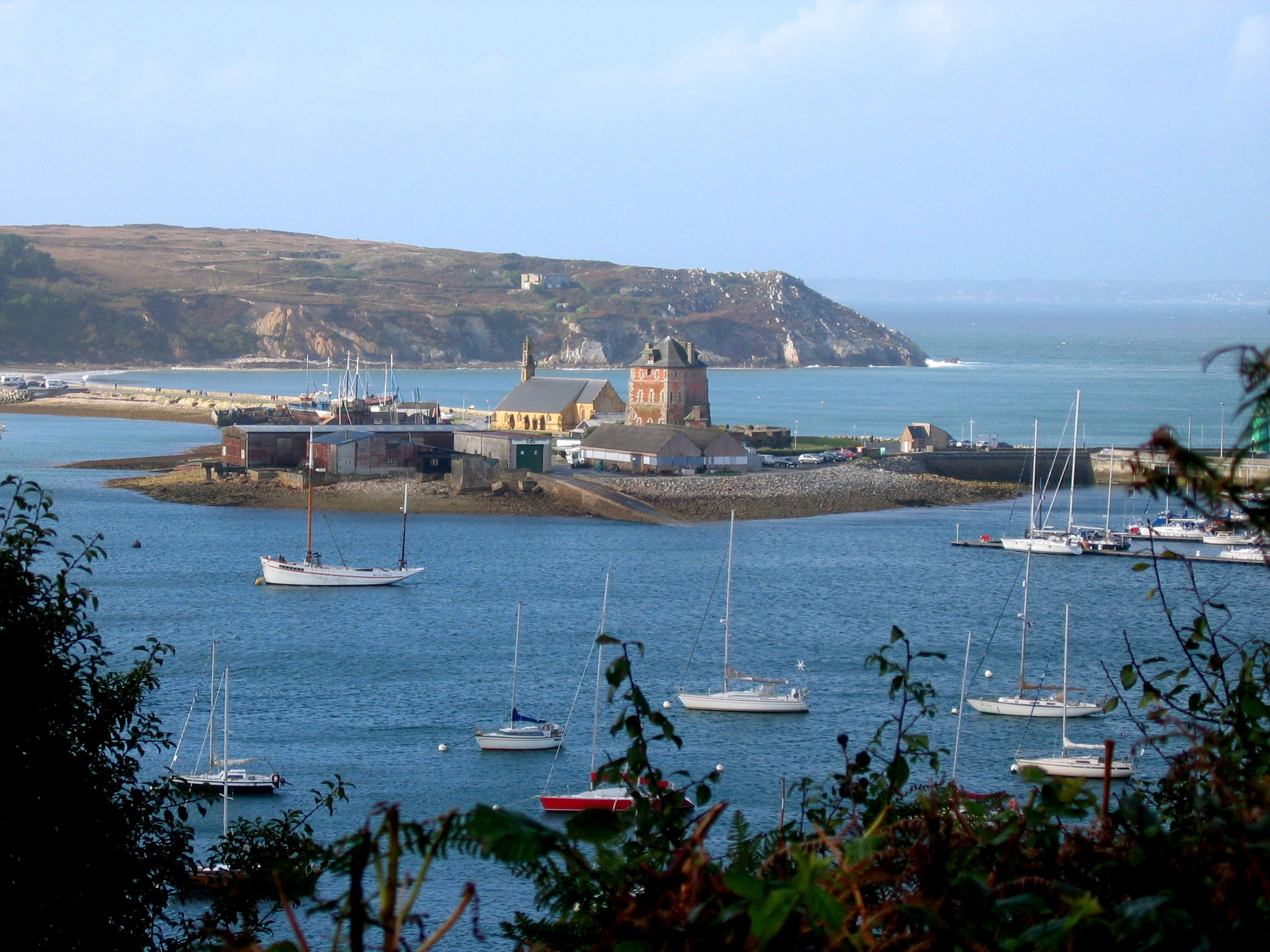 Le Sillon de Camaret-sur-Mer vue de la rue des Pins